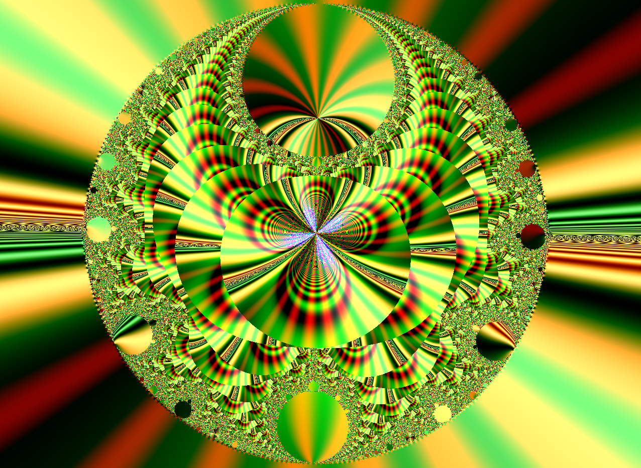 Mandelbrot, plane: 1/lambda; Created with XaoS